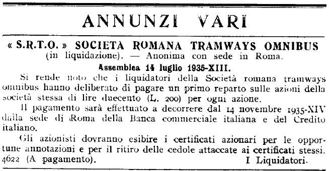 liquidazione srto